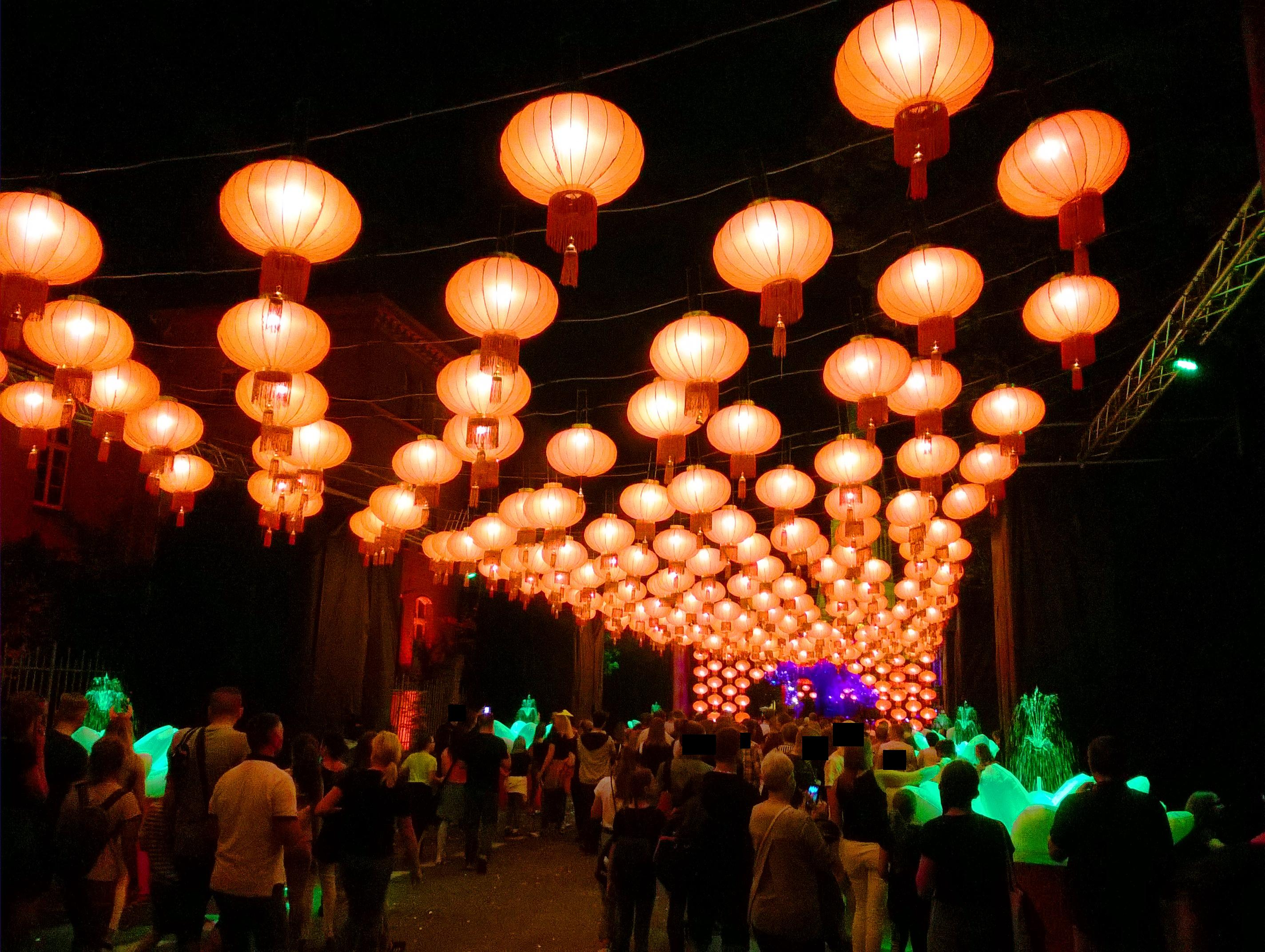 Bella Skyway Festival w1 Toruniu 2019